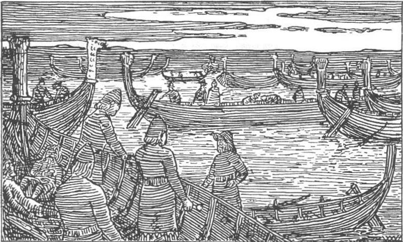 Wilhelm Wetlesen: Illustration for Harald Hardrådes saga, Heimskringla 1899-edition. nn: «Jarlen talar med Vandråd.»